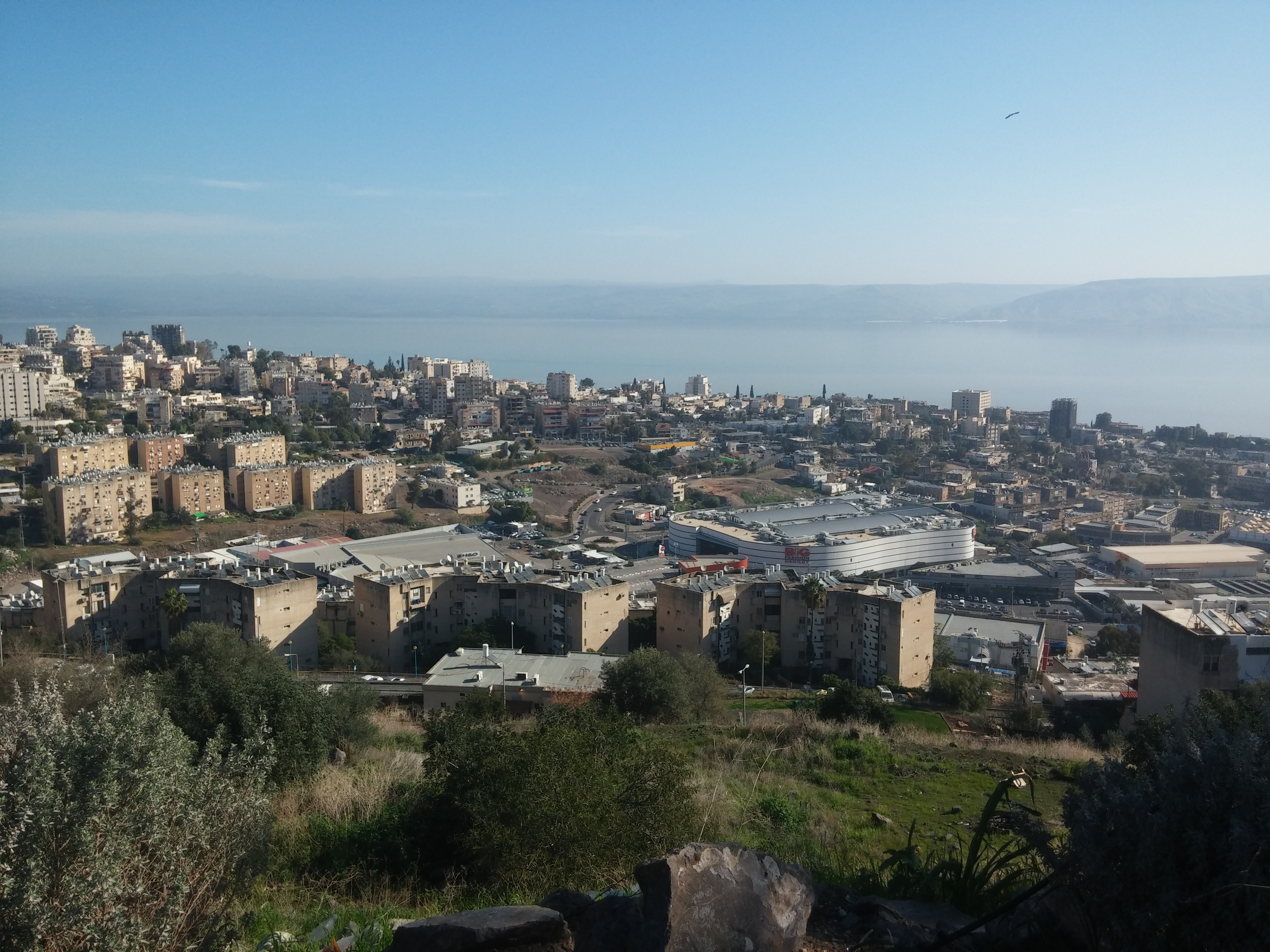 Photoes by Dr. Anat Avital קברי רבי עקיבא והרמח"ל טבריה עילית